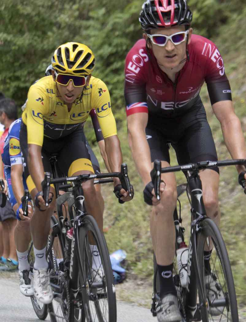 ALP20236 favorietengroep